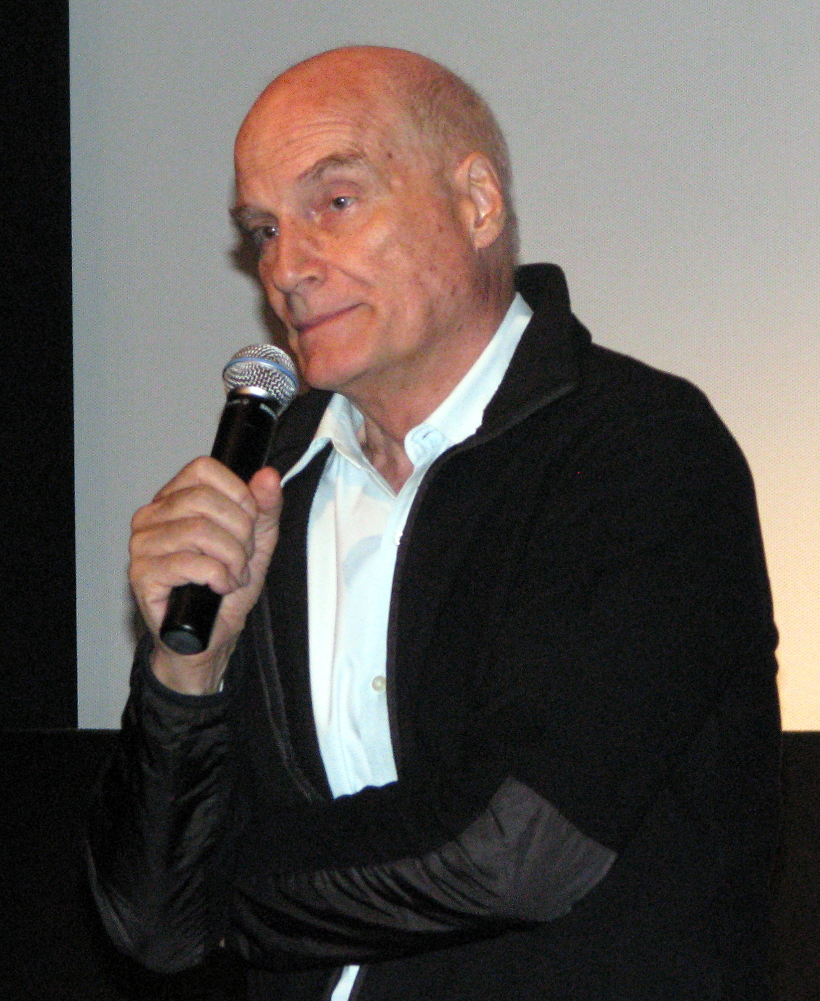 Director Barbet Schroeder, of "Inju, la bete dans l'ombre".